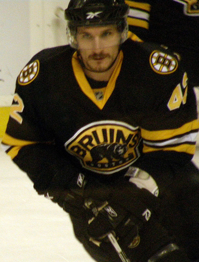 Trent Whitfield v dresu Boston Bruins.